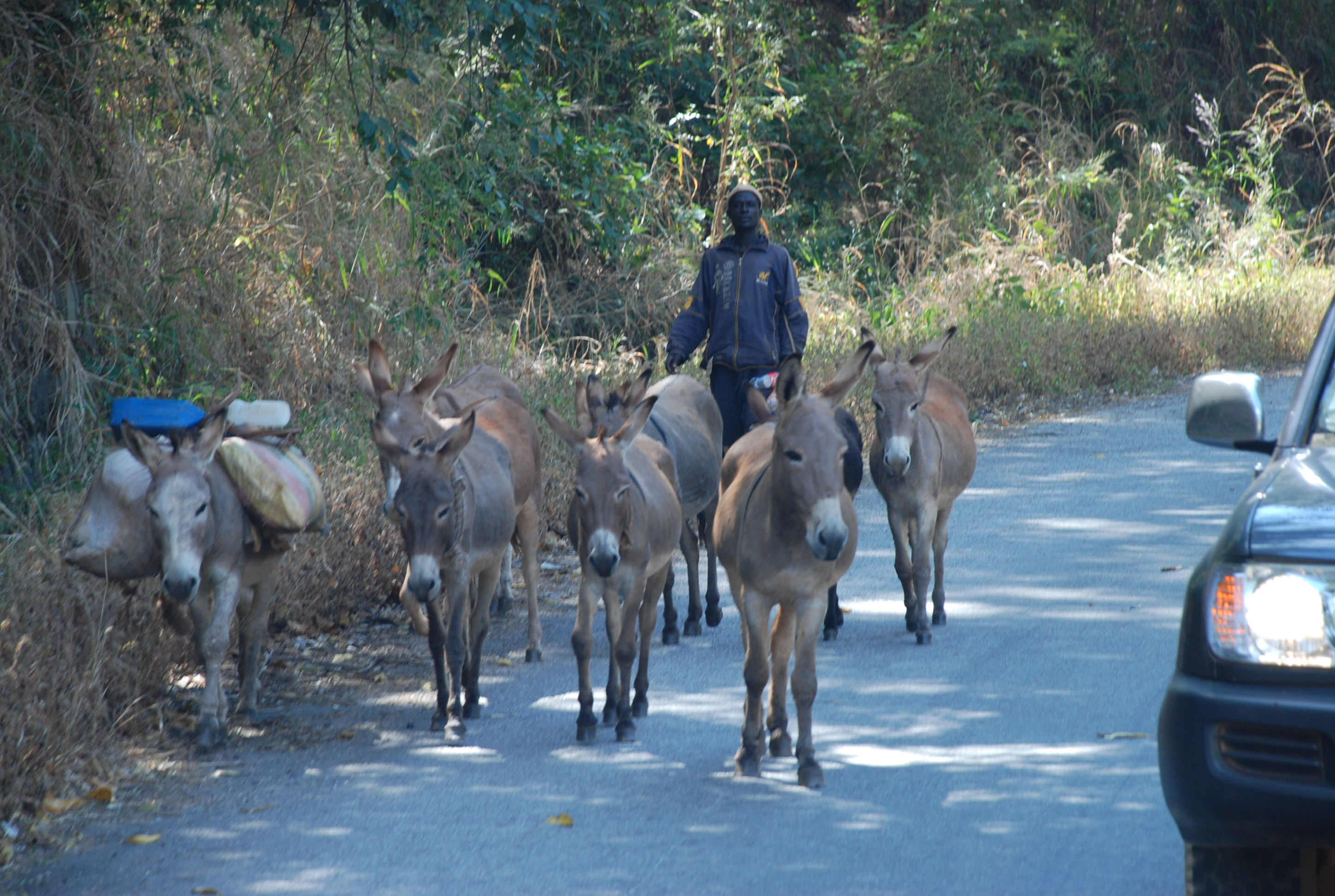 Déplacement des populations dans la ville de Garoua au Cameroun This is an image with the theme "Africa on the Move or Transport" from: Cameroon